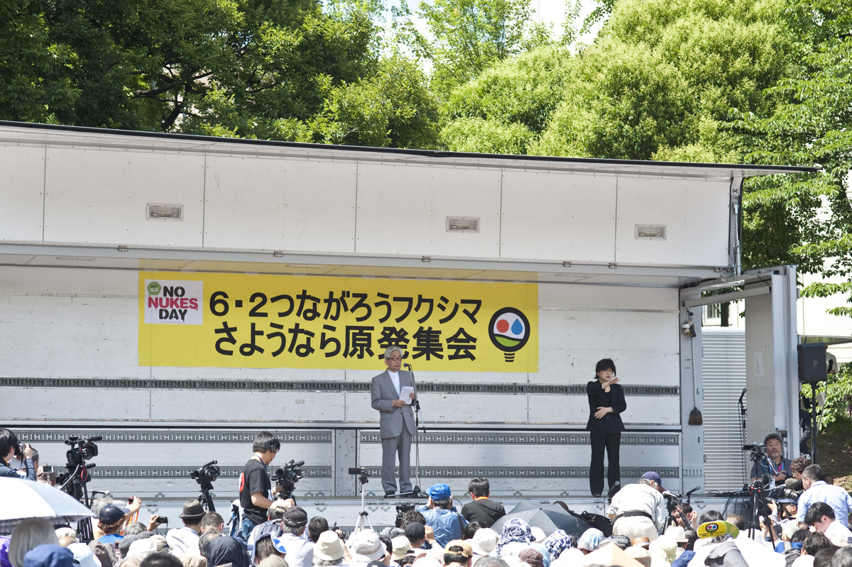 No Nukes 6.2, 2013 芝公園-日比谷公園-国会議事堂前 Shiba koen - Hibiya Koen - The Diet Building (Parliament, Kokkai Gijido)